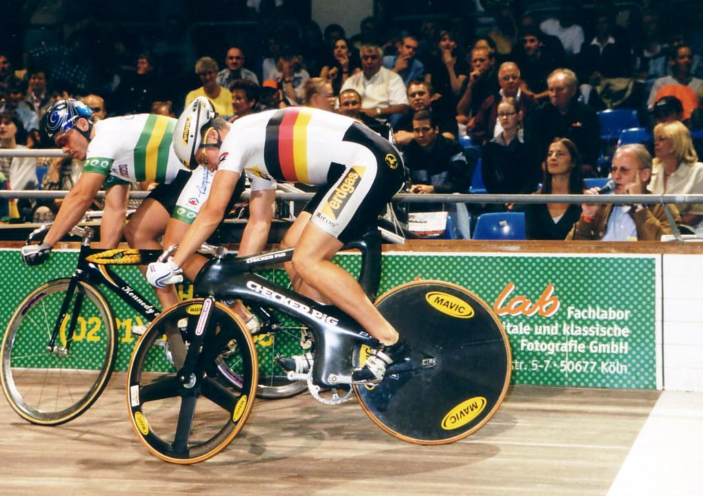 Darryn Hill (l.), australischer Radsportler, Jens Fiedler (r.) deutscher Radsportler